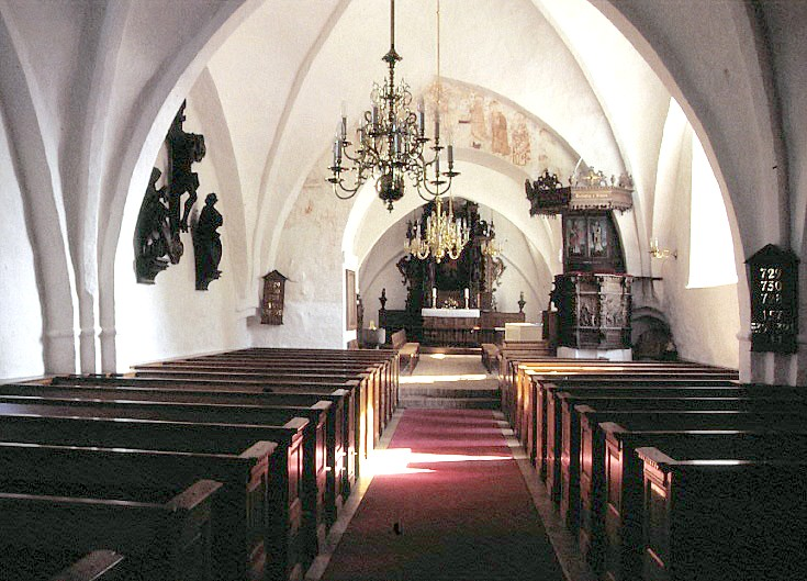 Asperup Kirke i Danmark. Skibet set mod øst